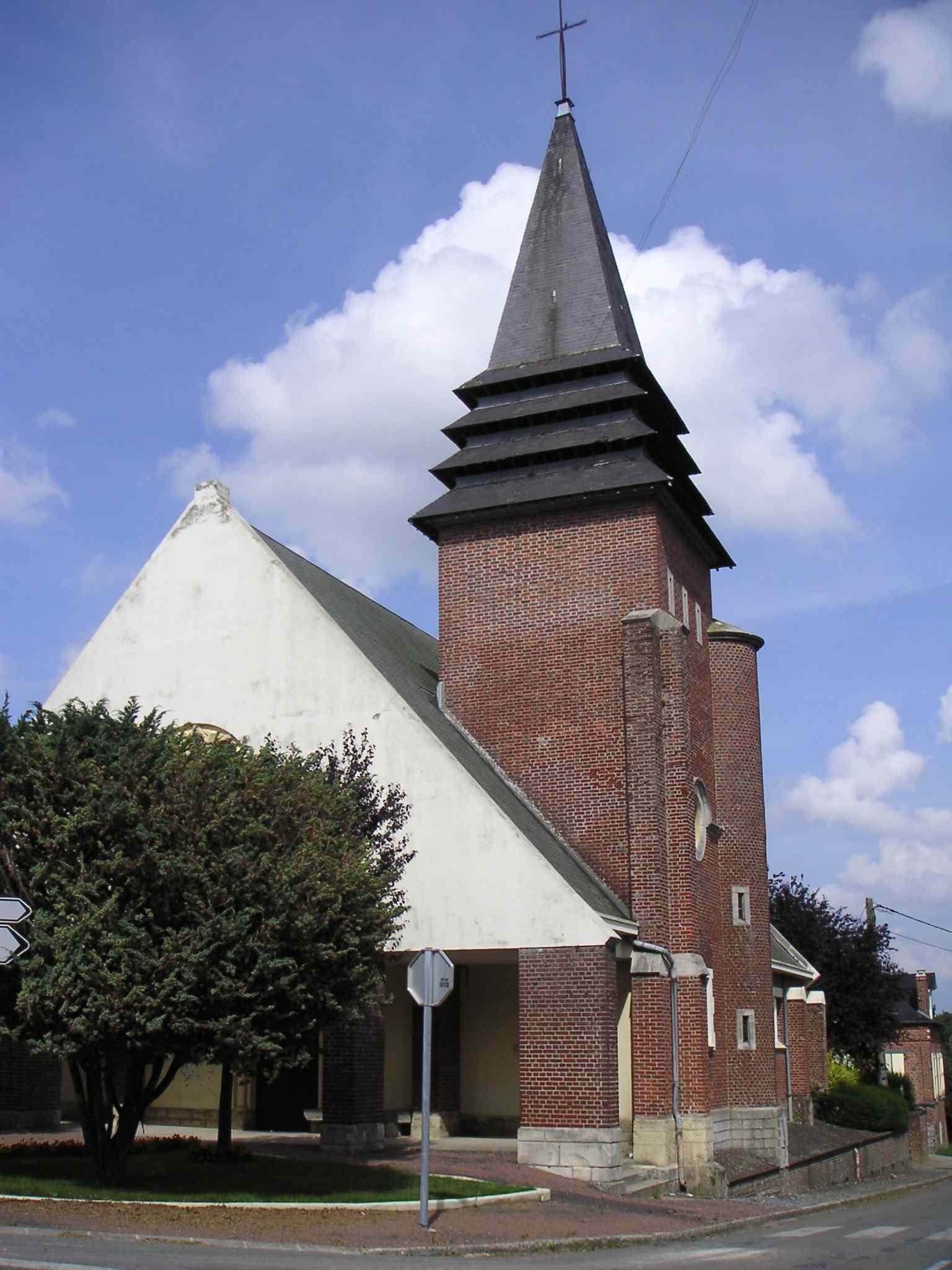 Cette photo de l'église de la Vallée au Blé (Aisne) a été prise par moi le 2 septembre 2005